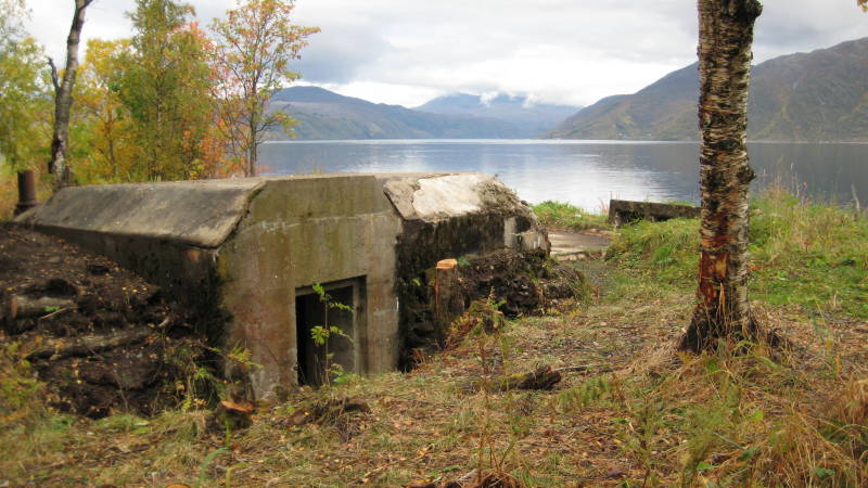 Bilde bunkers ved Røsvik kystfort